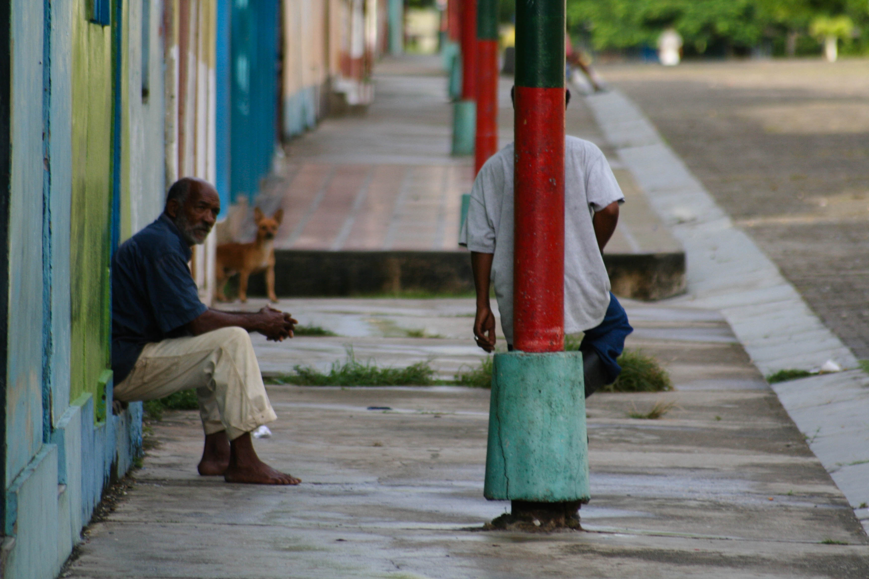 Pobladores de Macuro